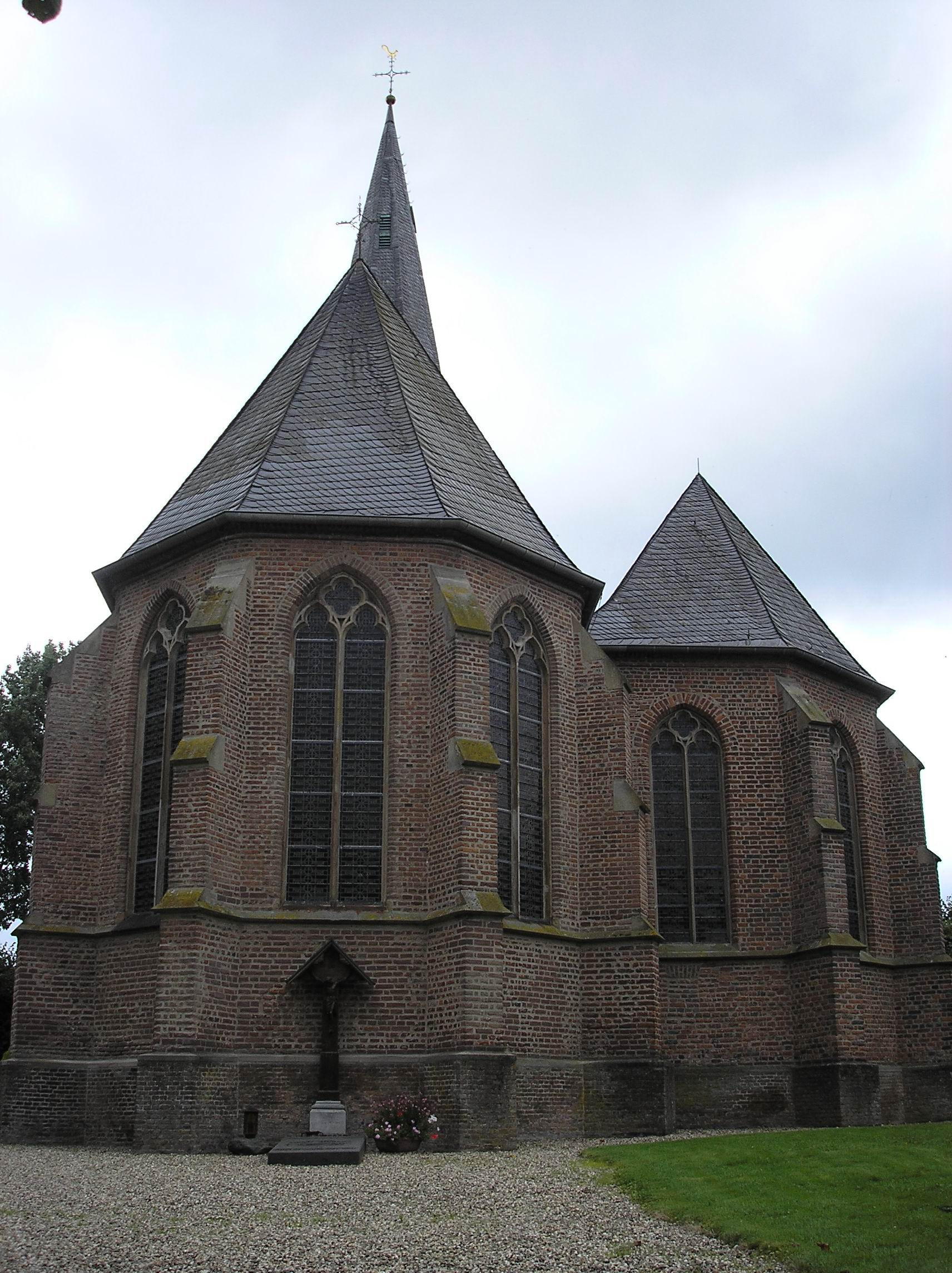 Kirche St. Bonifatius in Niel, Gemeinde Kranenburg - Ansicht von Osten